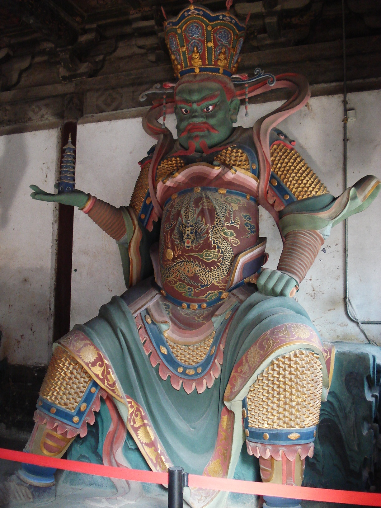 北京大觉寺多闻天。